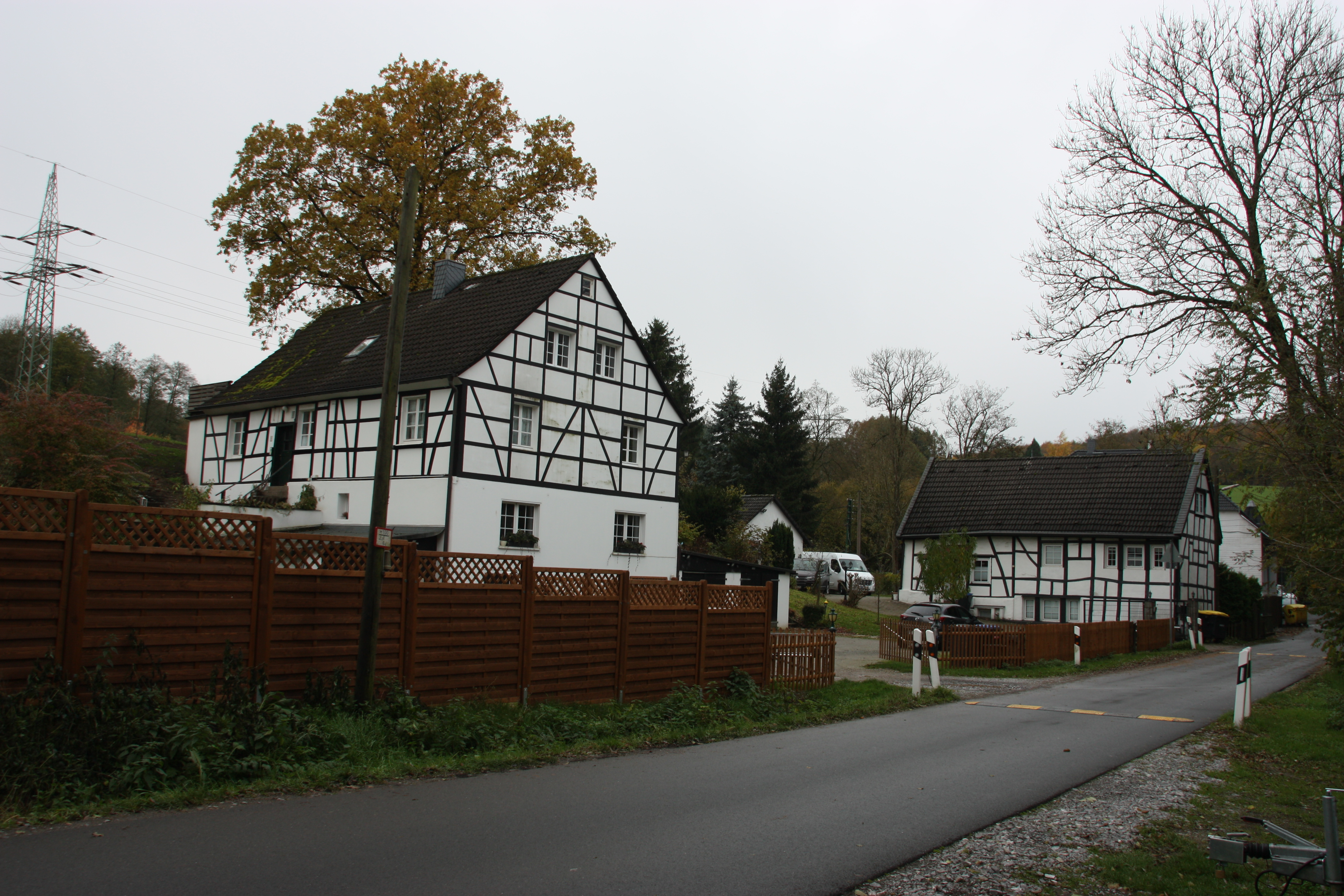 Velbert, Hefel, Rottberg, Mühle, Röbbeck, Eintrachtstraße